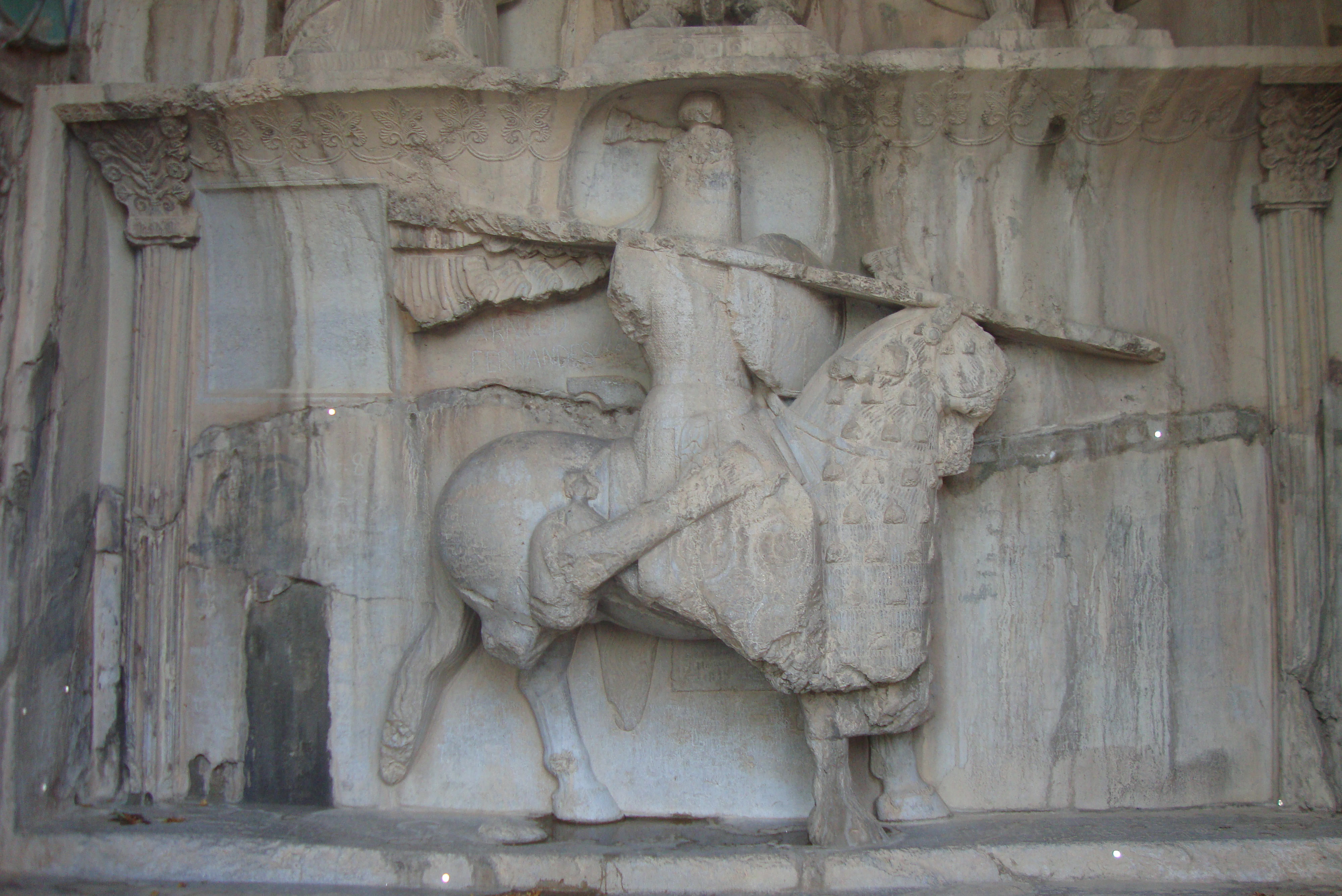 طاق بستان-نقش خسروپرویز سوار بر شبدیز